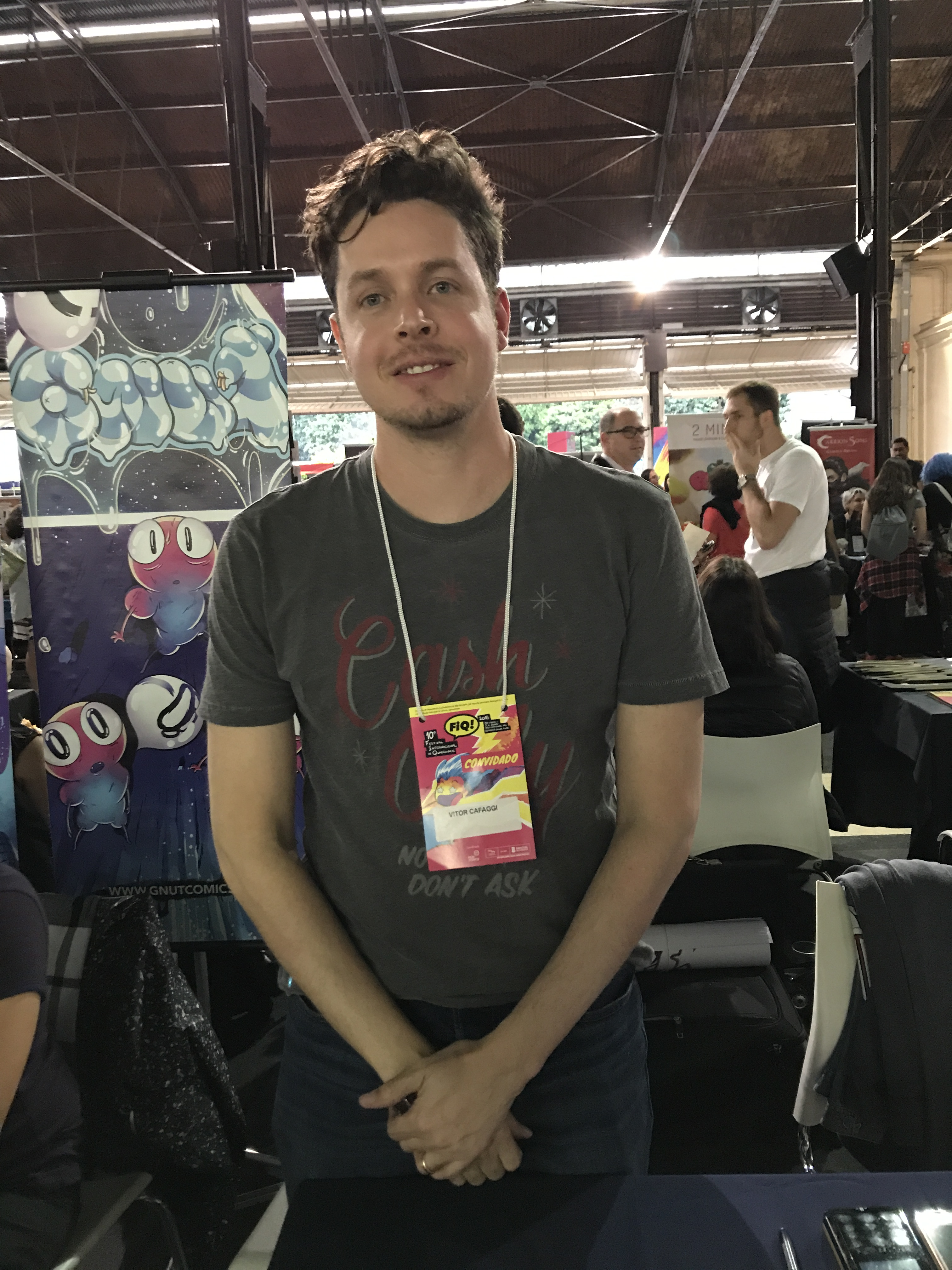 Artista Vitor Cafaggi na edição de 2018 do Festival Internacional de Quadrinhos.